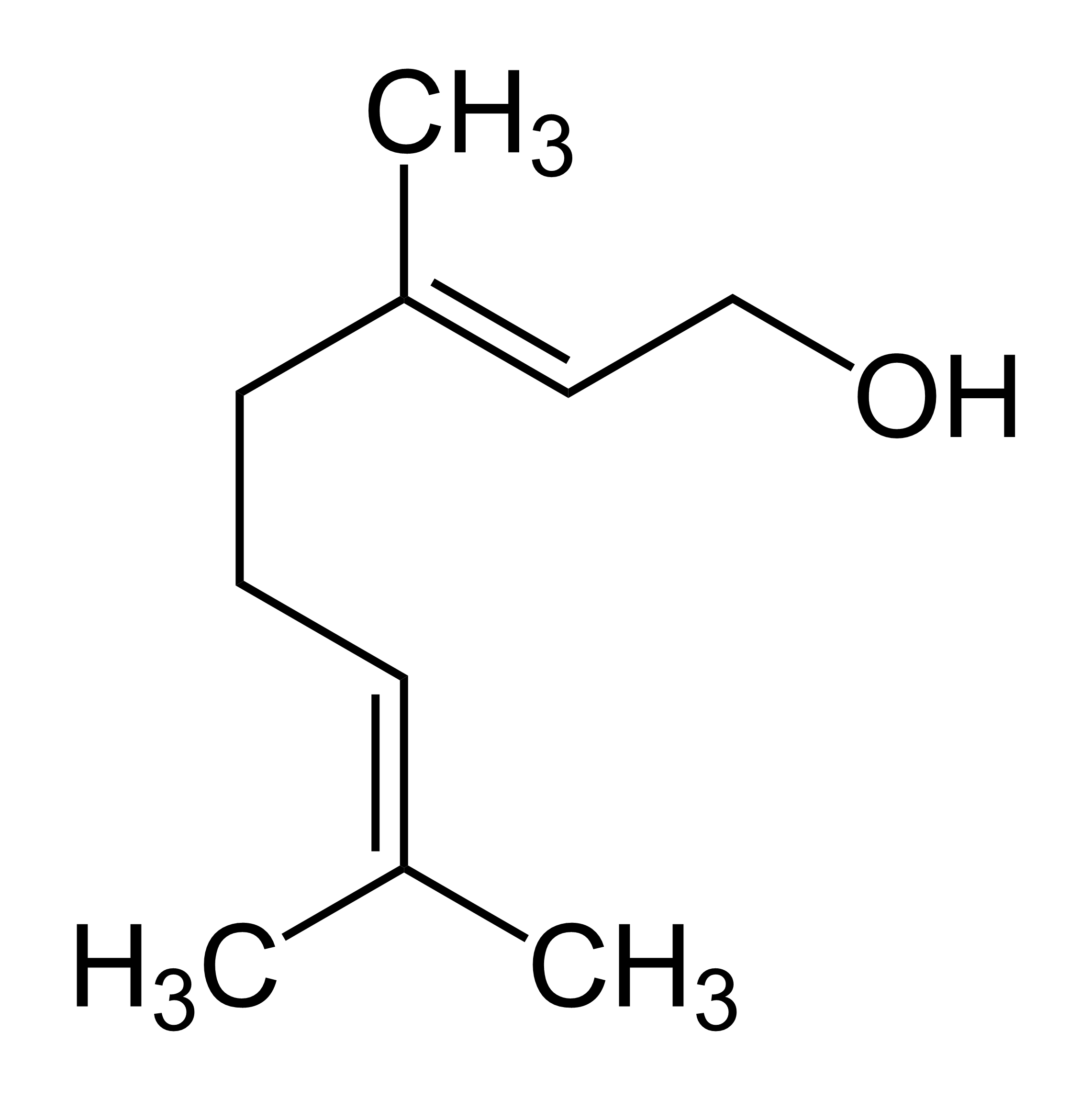 Geraniol (Bestandteil ätherischer Öle)